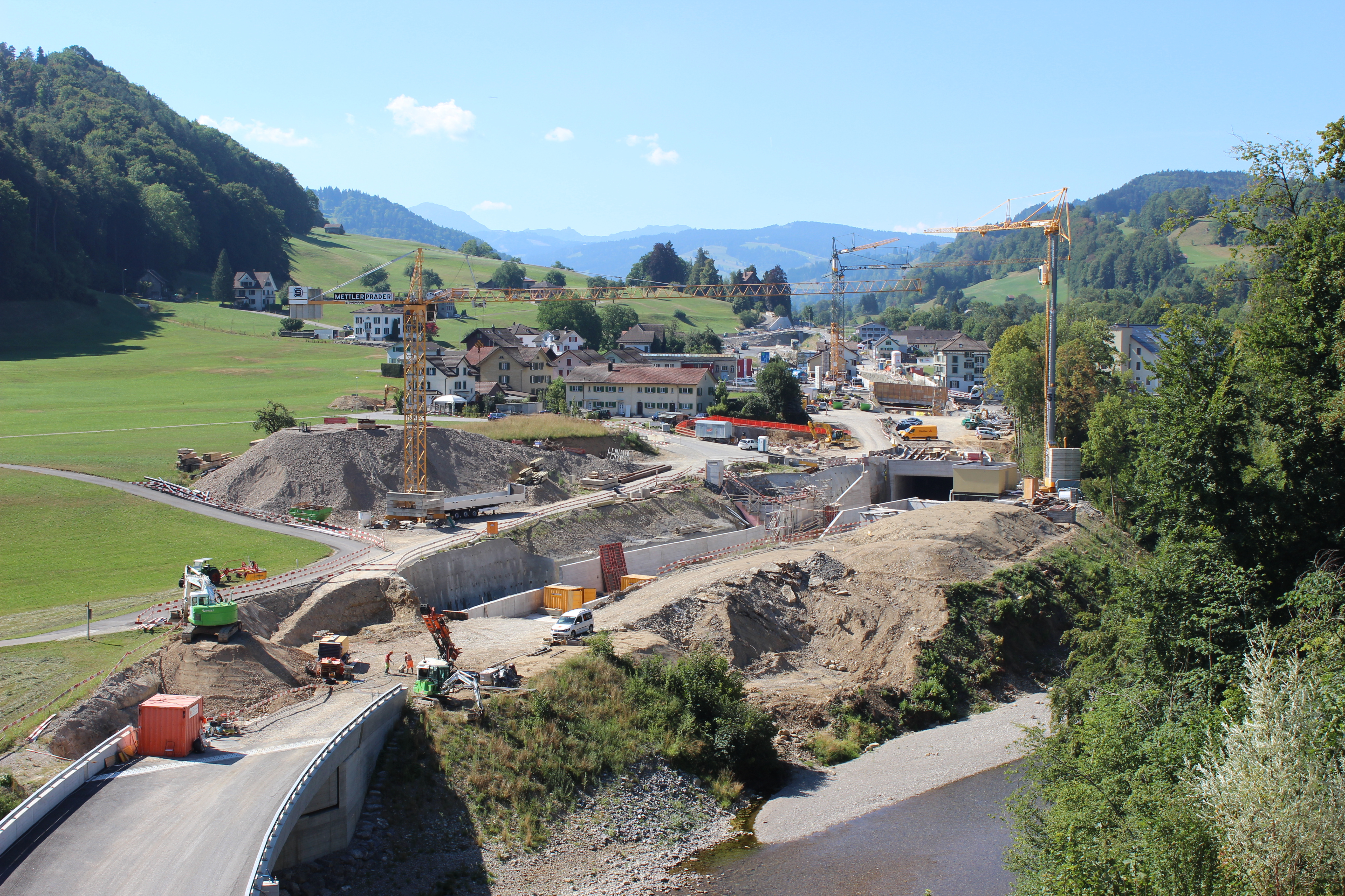 Sicht auf die Baustelle des Anschluss Neudietfurt der Umfahrungsstrasse Bütschwil